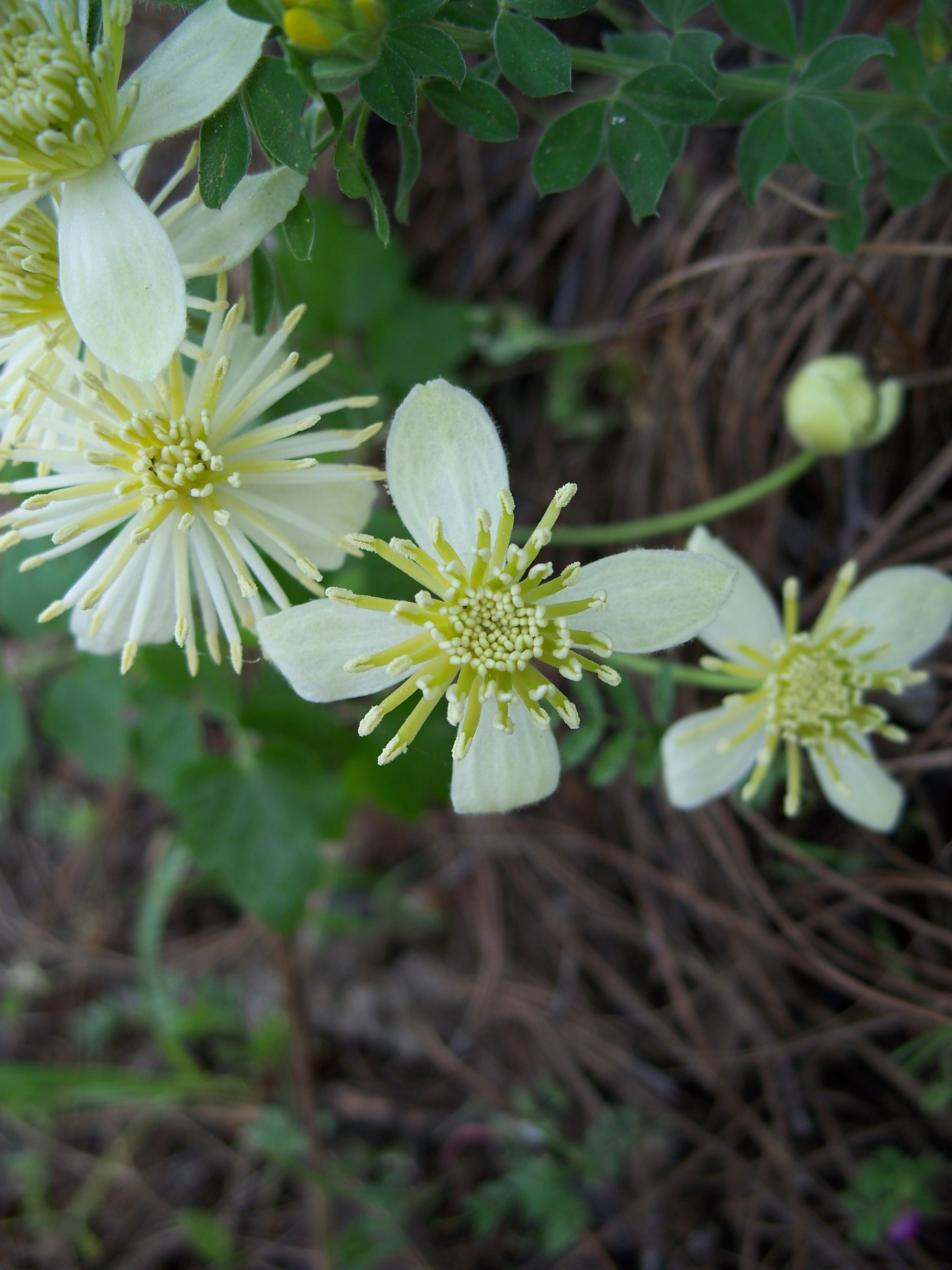 Clematis lasiantha Made in Saratoga, California, USA. Identified by Franz Xaver.